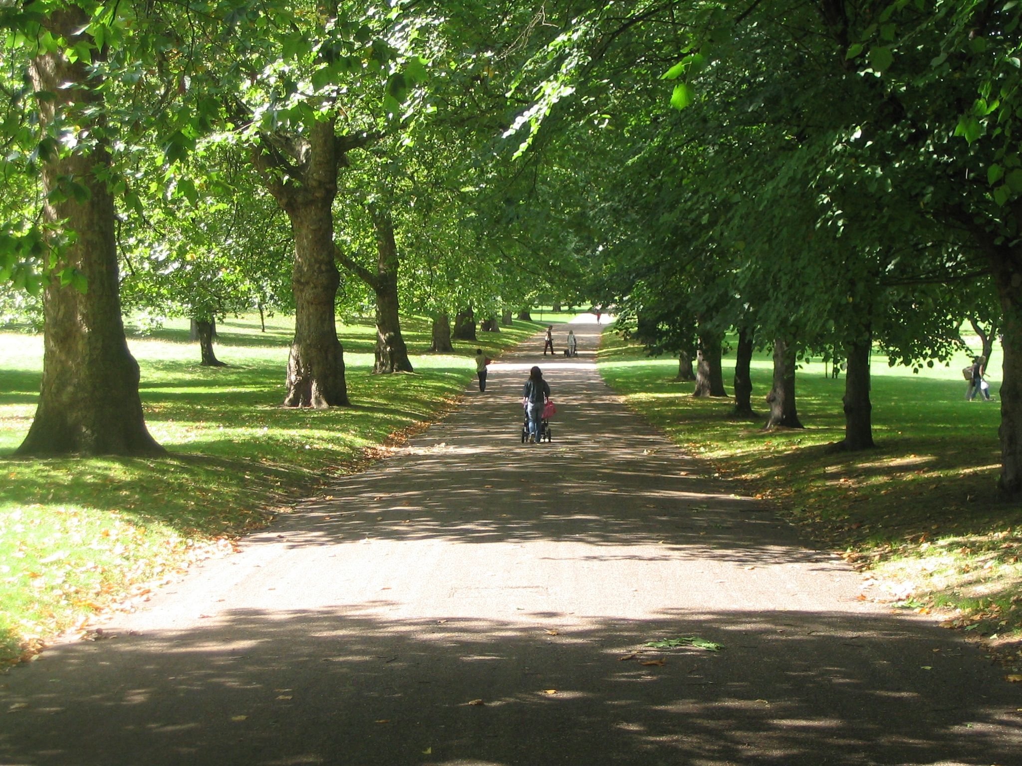 Hyde Park, Londyn.